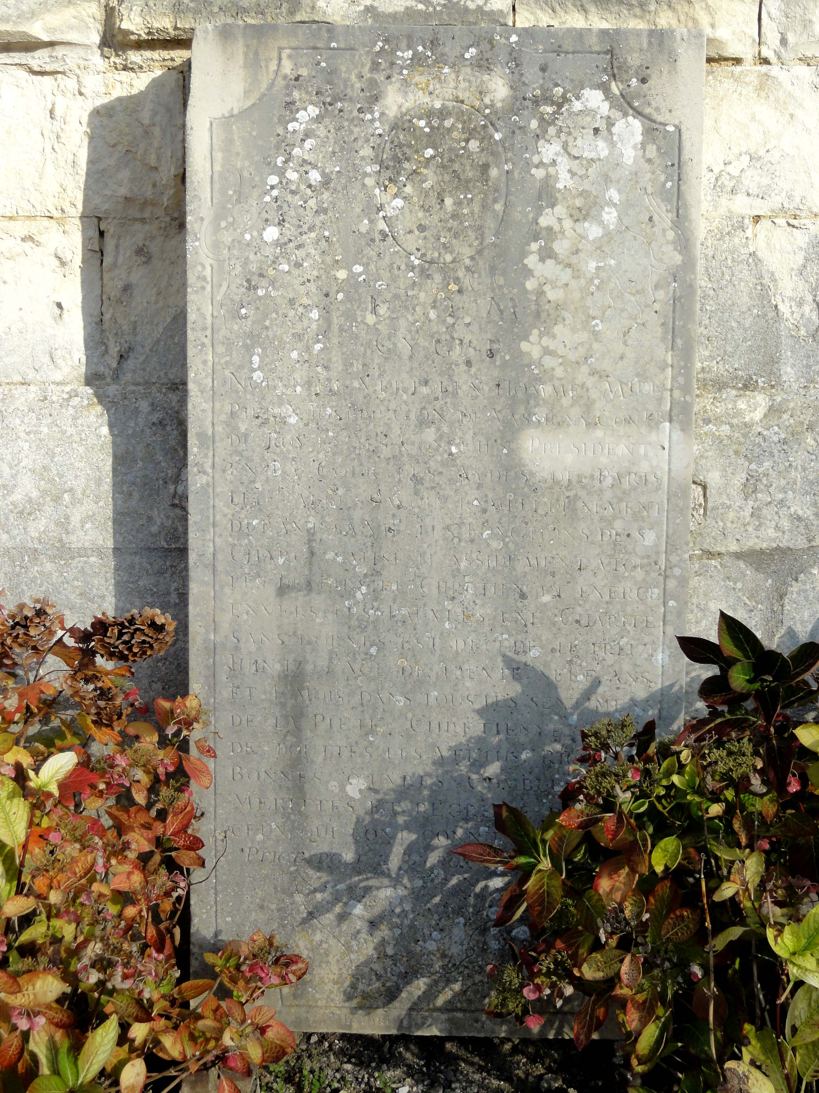 Bas-côté sud, dalle funéraire de Pierre Joseph Gon de Vassigny, président de la Cour des aides de Paris, mort le 13 juin 1723 à l'âge de trente-neuf ans.